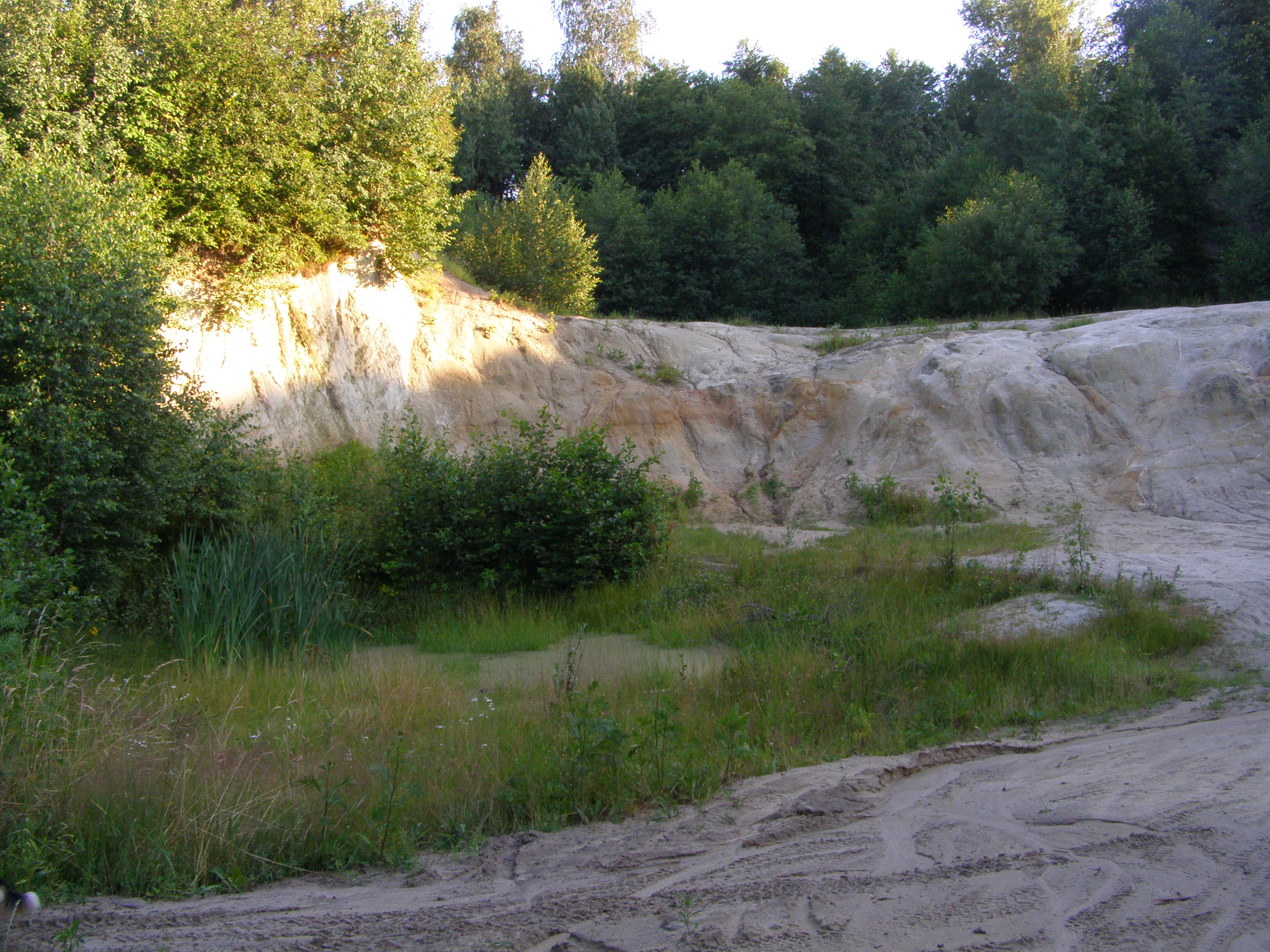 Hodoňovice, pískovna